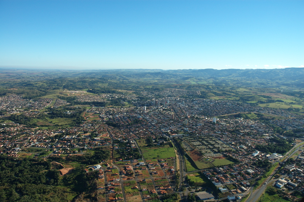 São João da Boa Vista - vista aérea